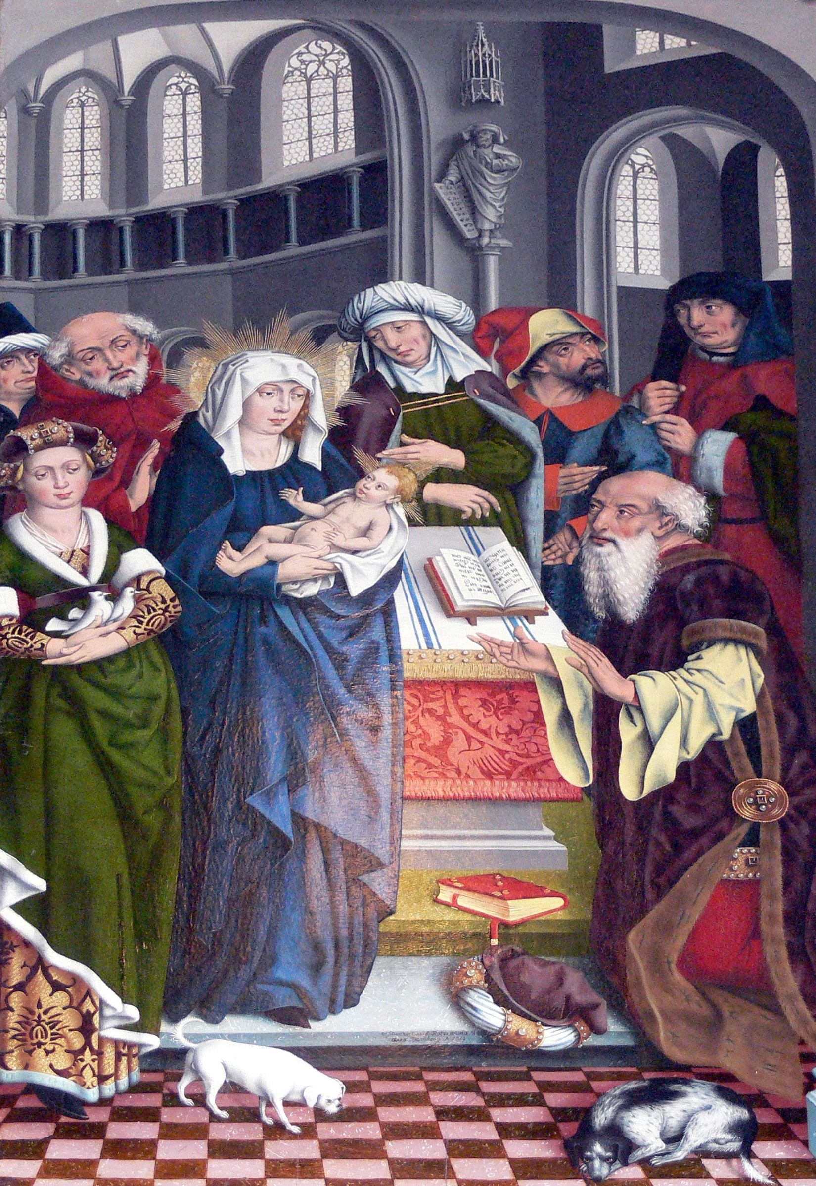 Hochaltar ( 1466 ) in St.Jakob in Rothenburg. Präsentation Christi im Tempel von Friedrich Herlin